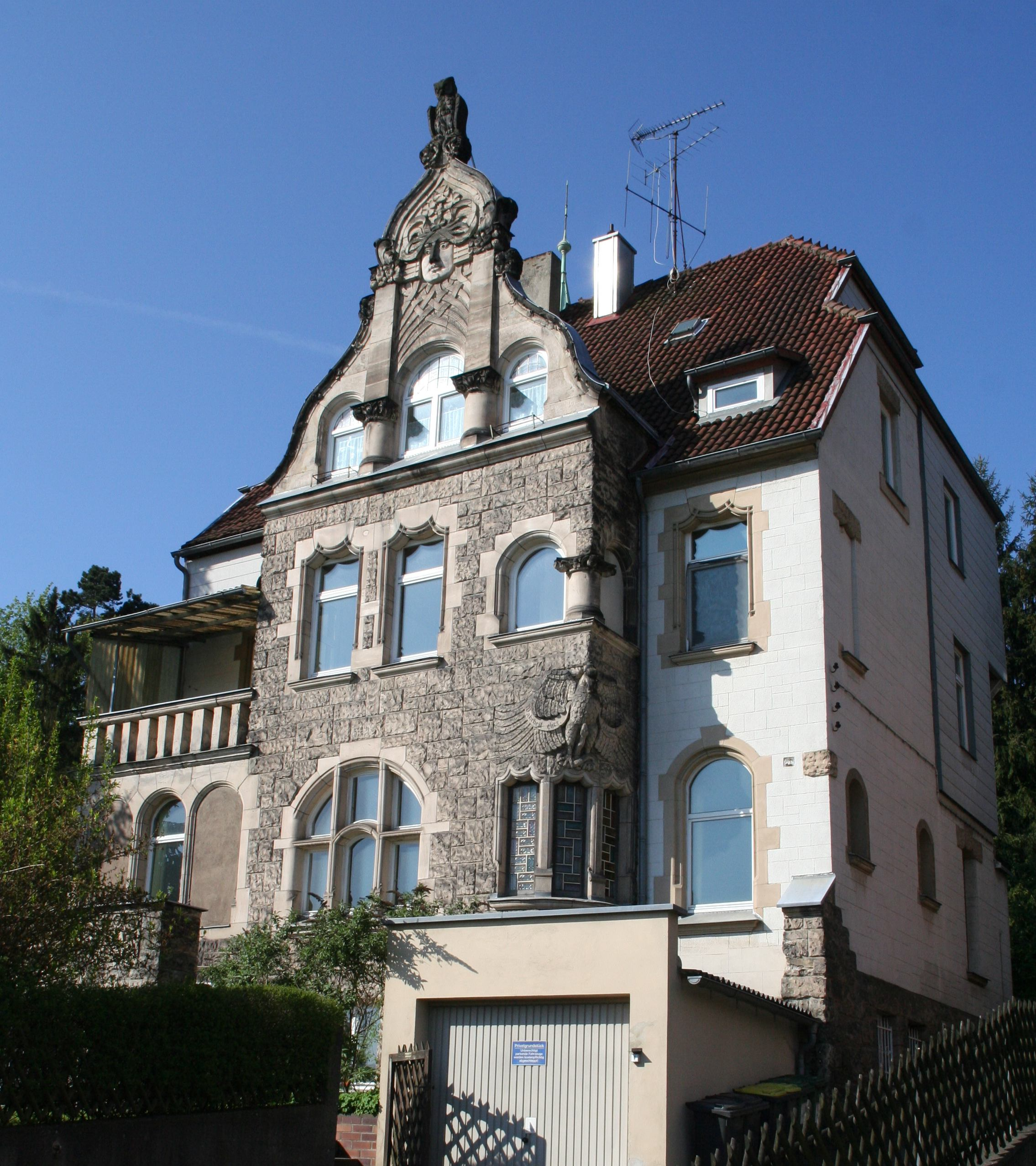 Adamistraße 6b in Coburg